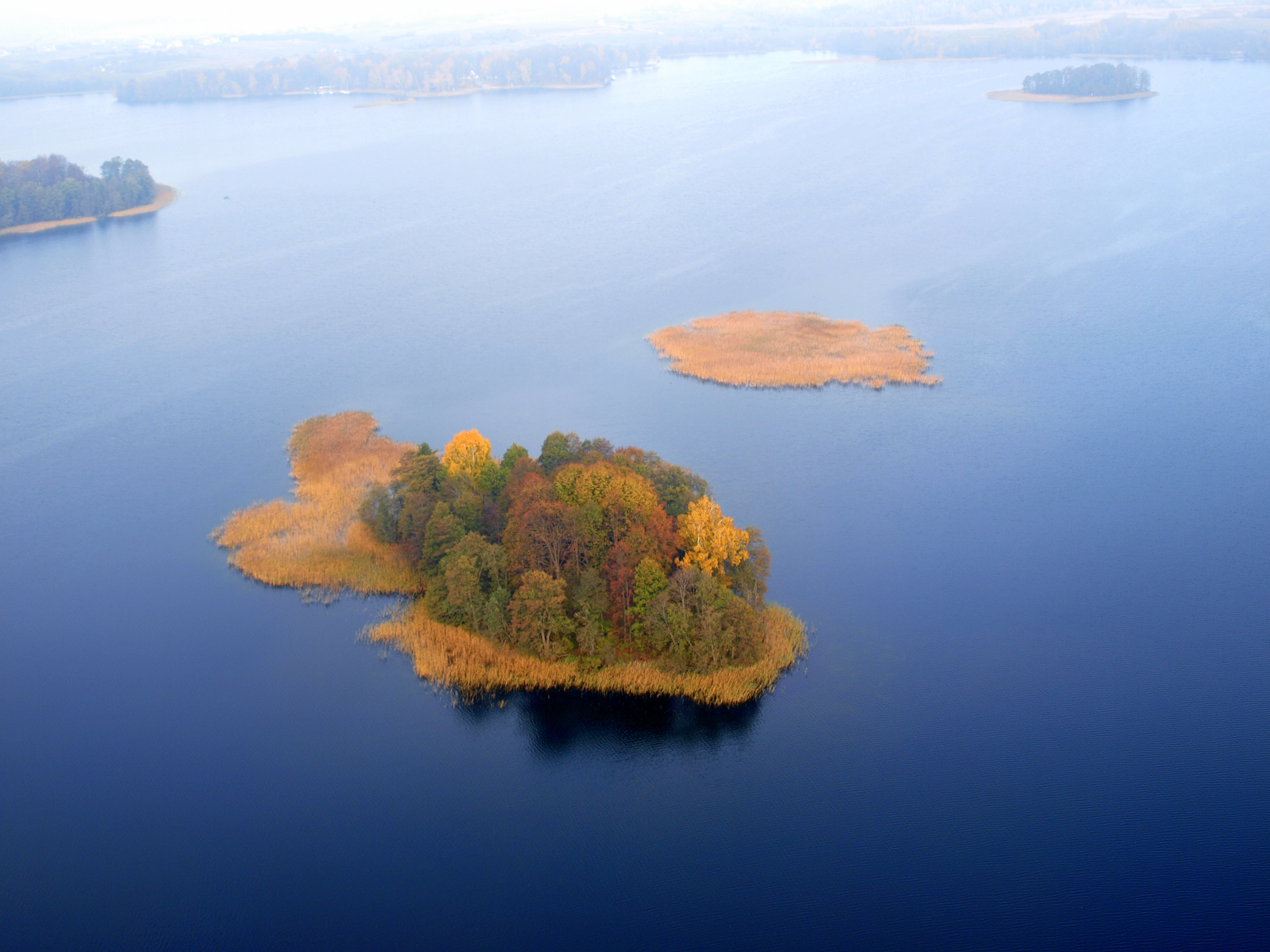 Trakai, Lithuania